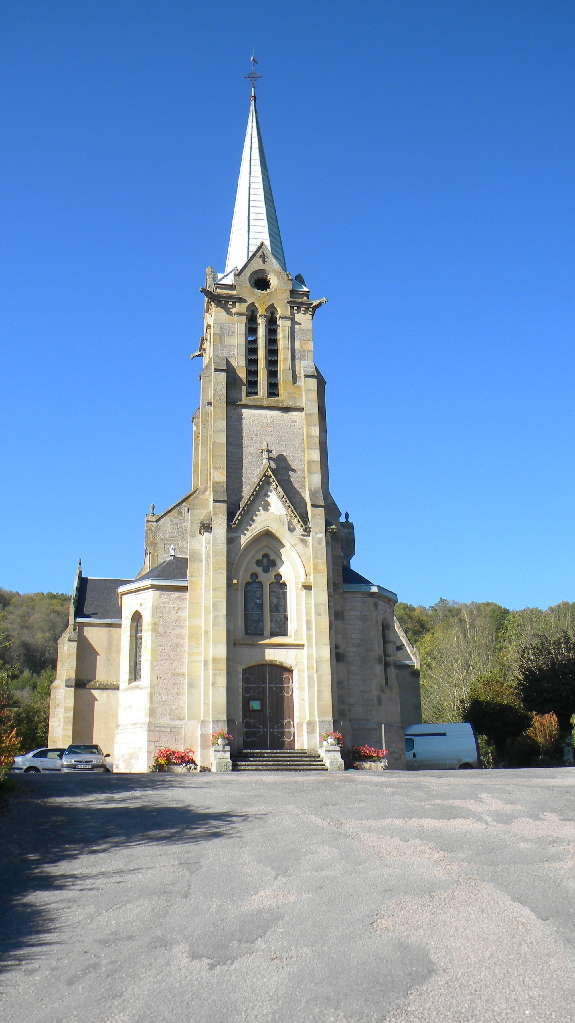 Preĝejo de Broye